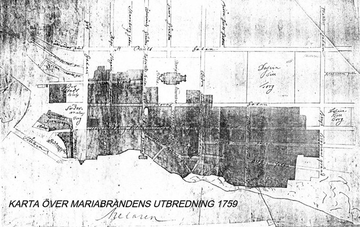 Kata över Mariabrandens utbredning, norr är nedåt